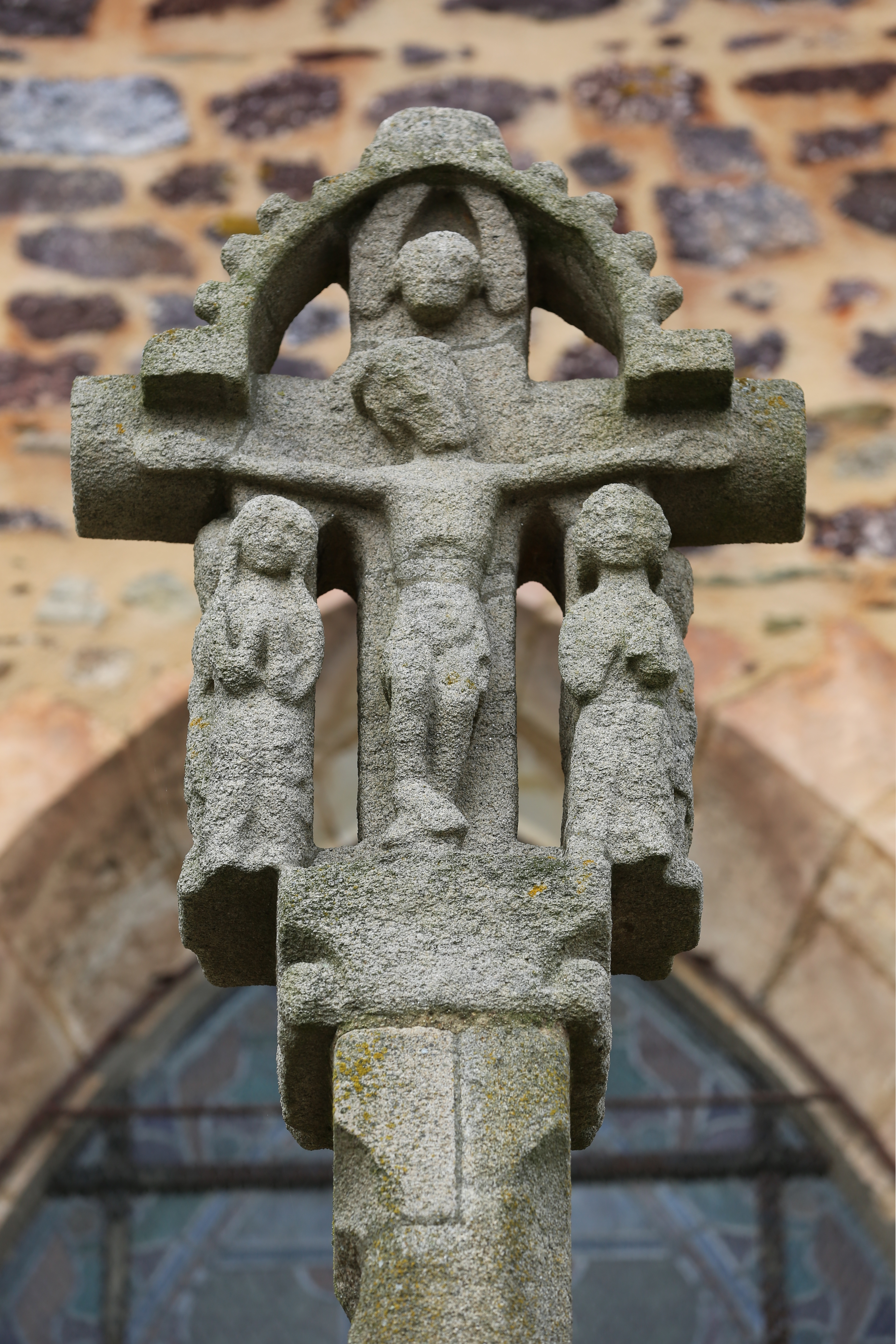 Ancienne croix de cimetière de Saint-Gilles, désormais installée sur la façade sud de l'église Saint-Gilles.